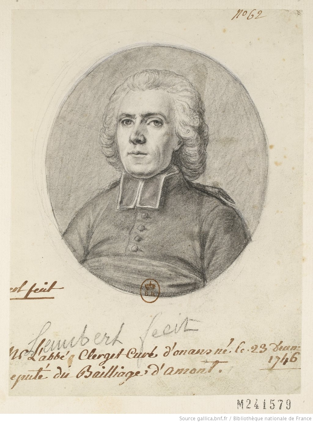 L'abbé Pierre-François Clerget (1746-1808). Considéré comme l'auteur le mieux renseigné sur le droit de prélassement au 18e siècle.